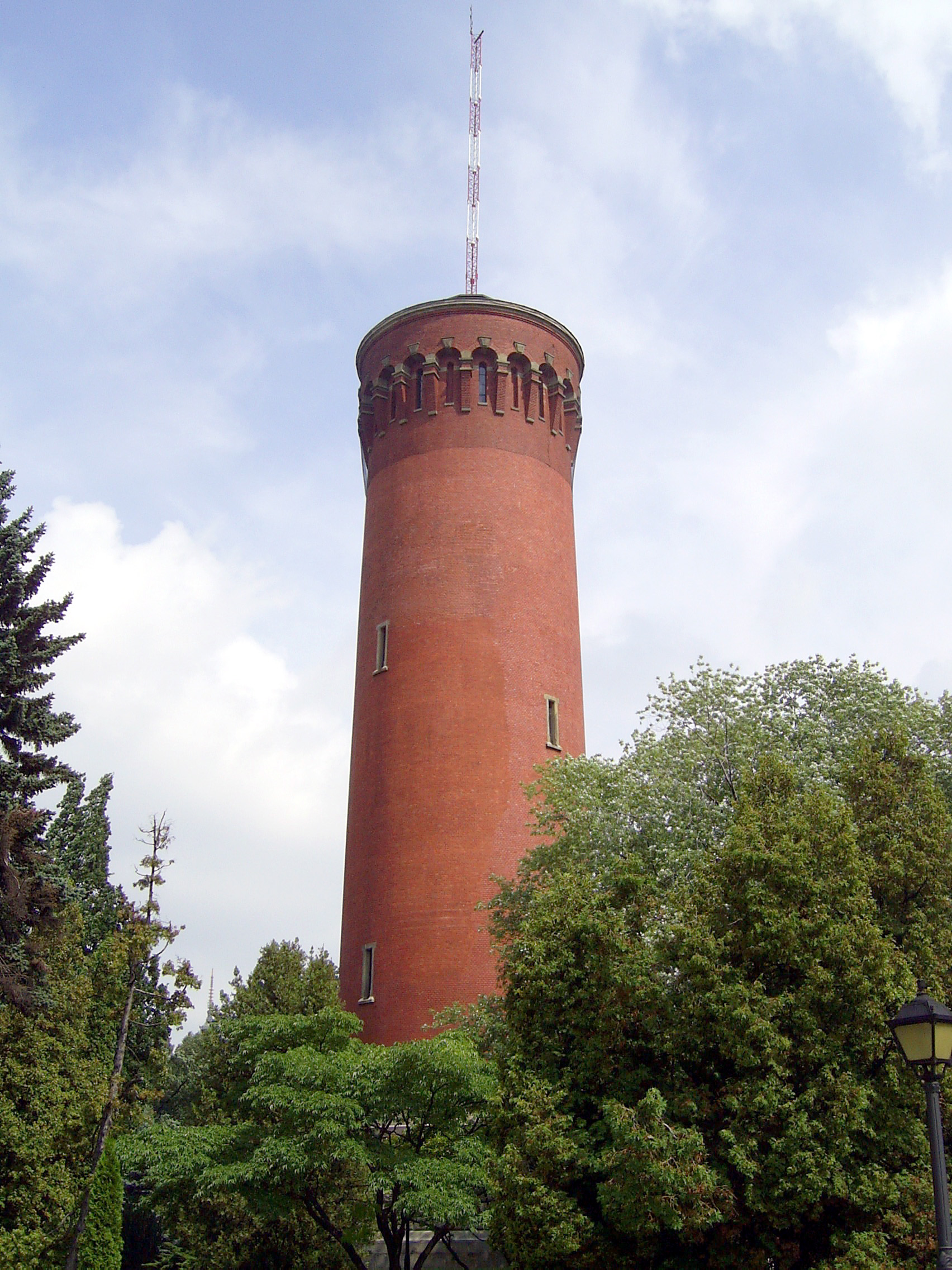 Filtry Lindleya - wieża ciśnień.